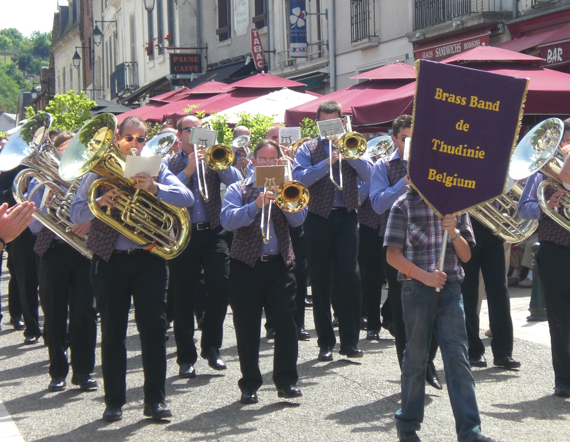 Le Brass Band de Thudinie au concours de marche à Amboise